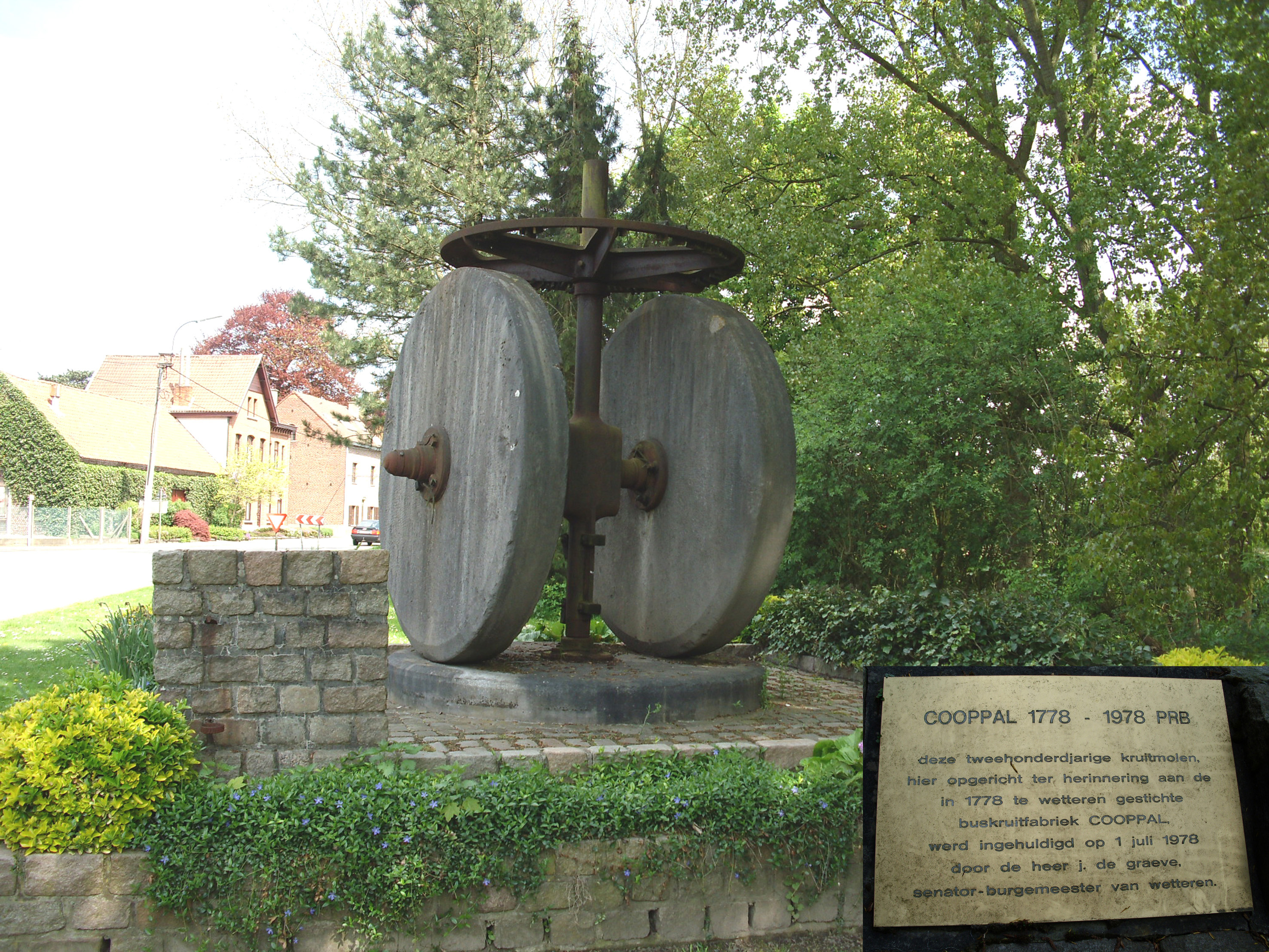 Poedermolen - Buskruitfabriek Cooppal - Stookte - Cooppallaan - Overschelde - Wetteren - Oost-Vlaanderen - Vlaanderen - België